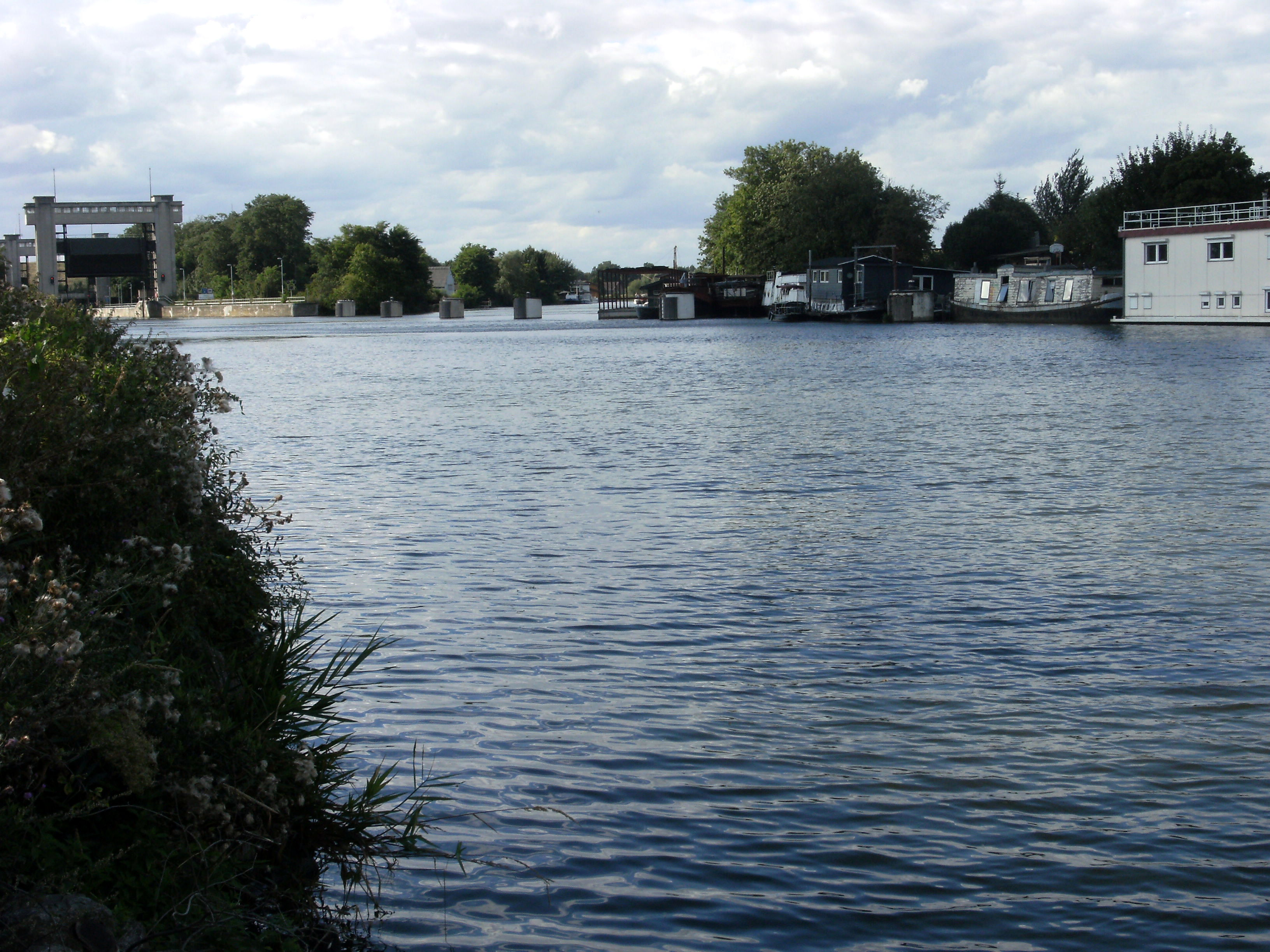 Maastricht 2012 Afvoerkanaal.